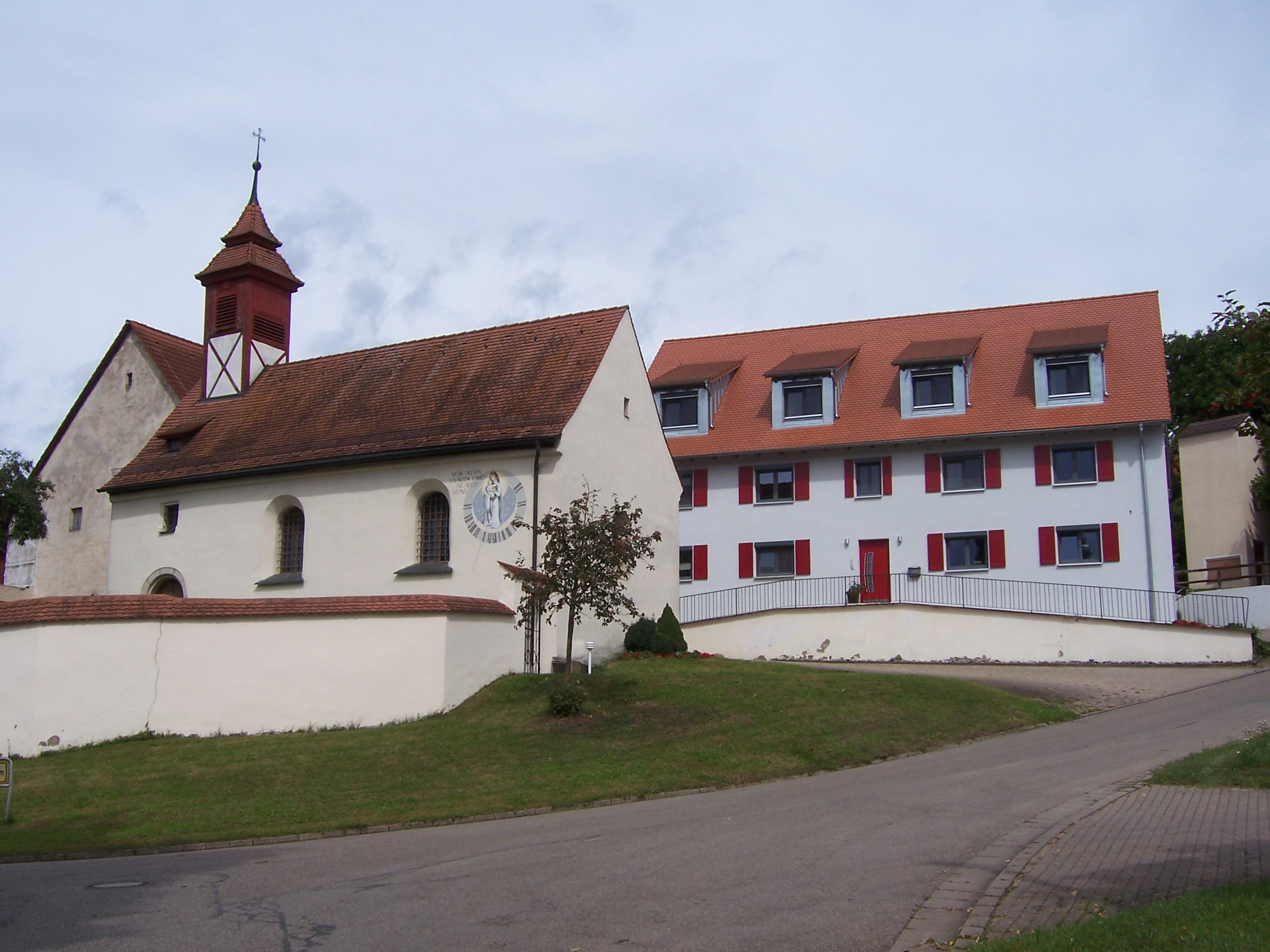 Katholische Ortskirche St. Otmar Ottmarsfeld